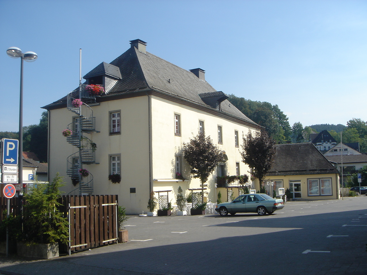 Drostenhaus